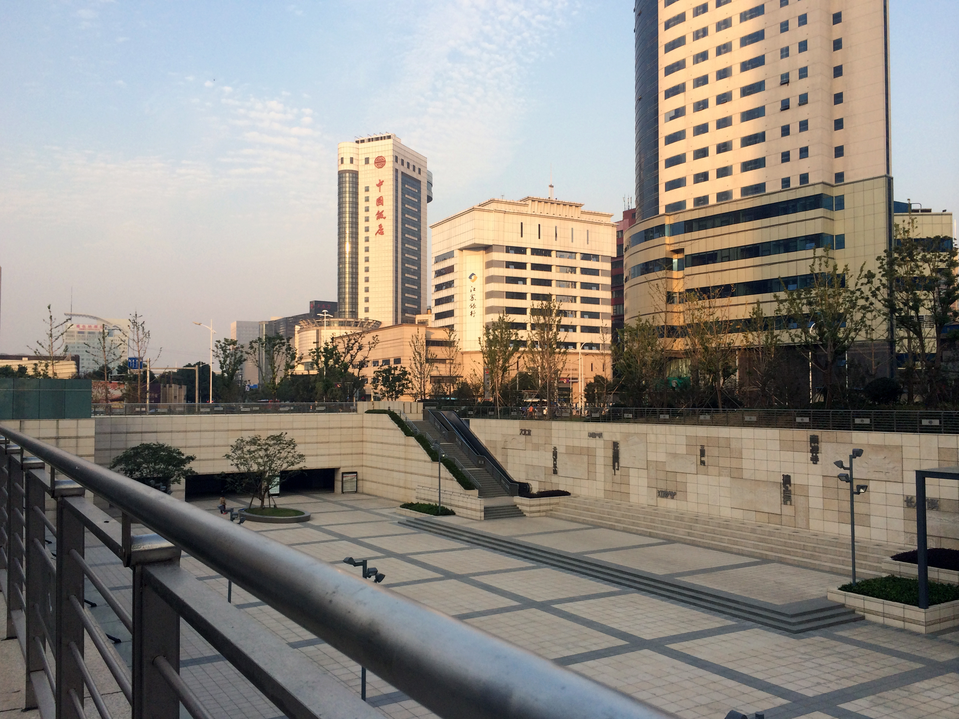 無錫中國飯店，從勝利門地鐵站遠眺。